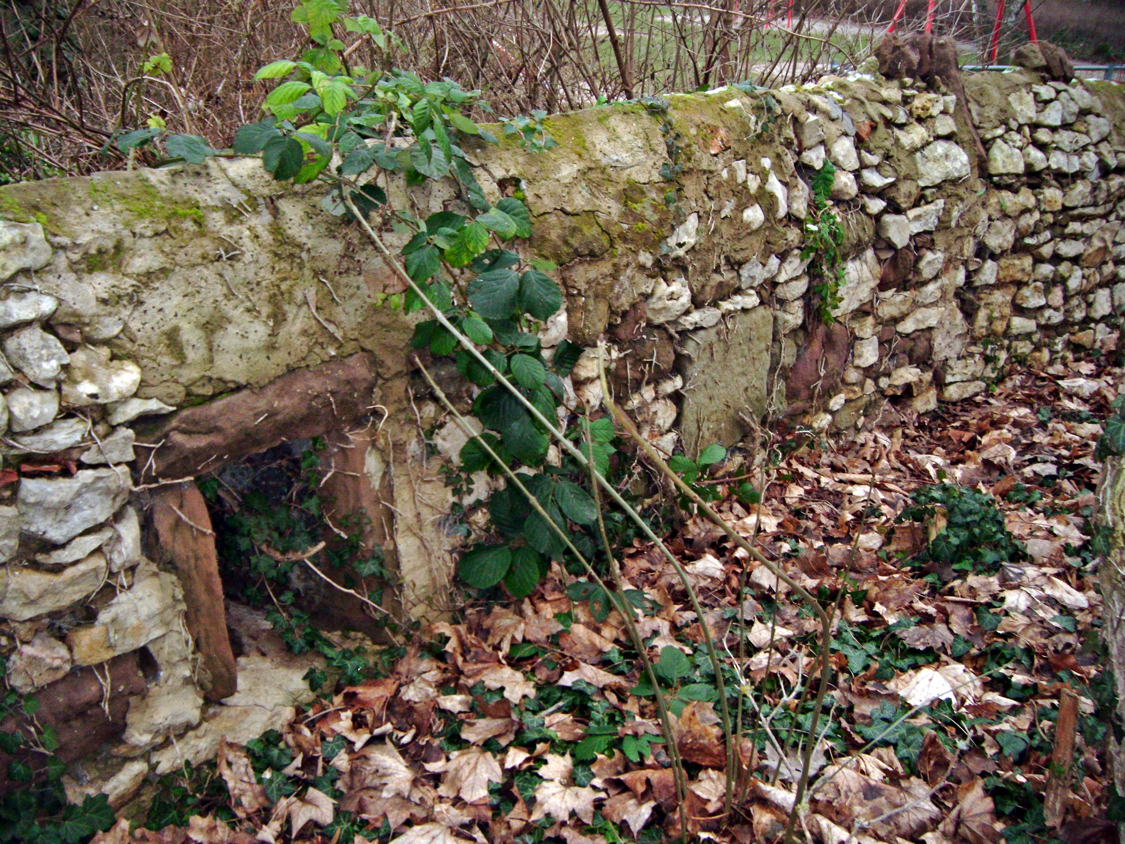 Grünstadt, Peterspark, mittelalterliche Wehrmauer (abgerissen nach 2015)